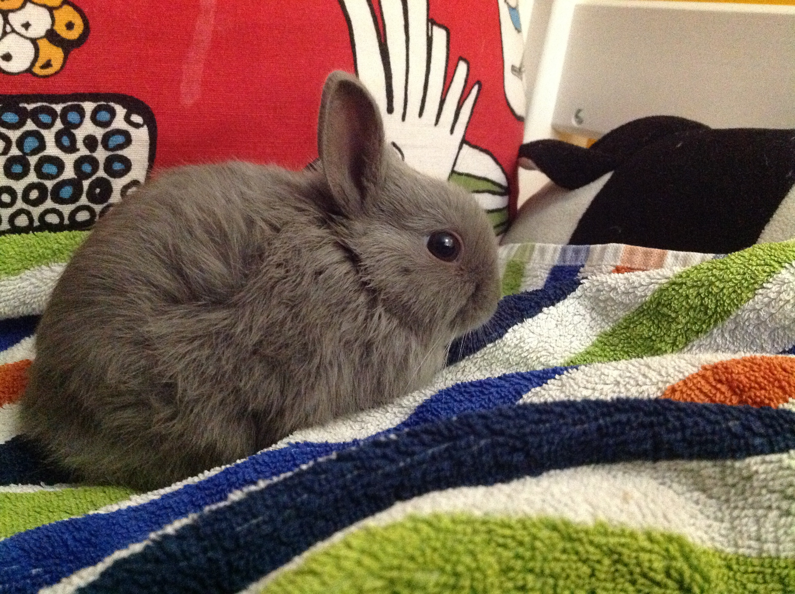 Ein Junges Zwergkaninchen